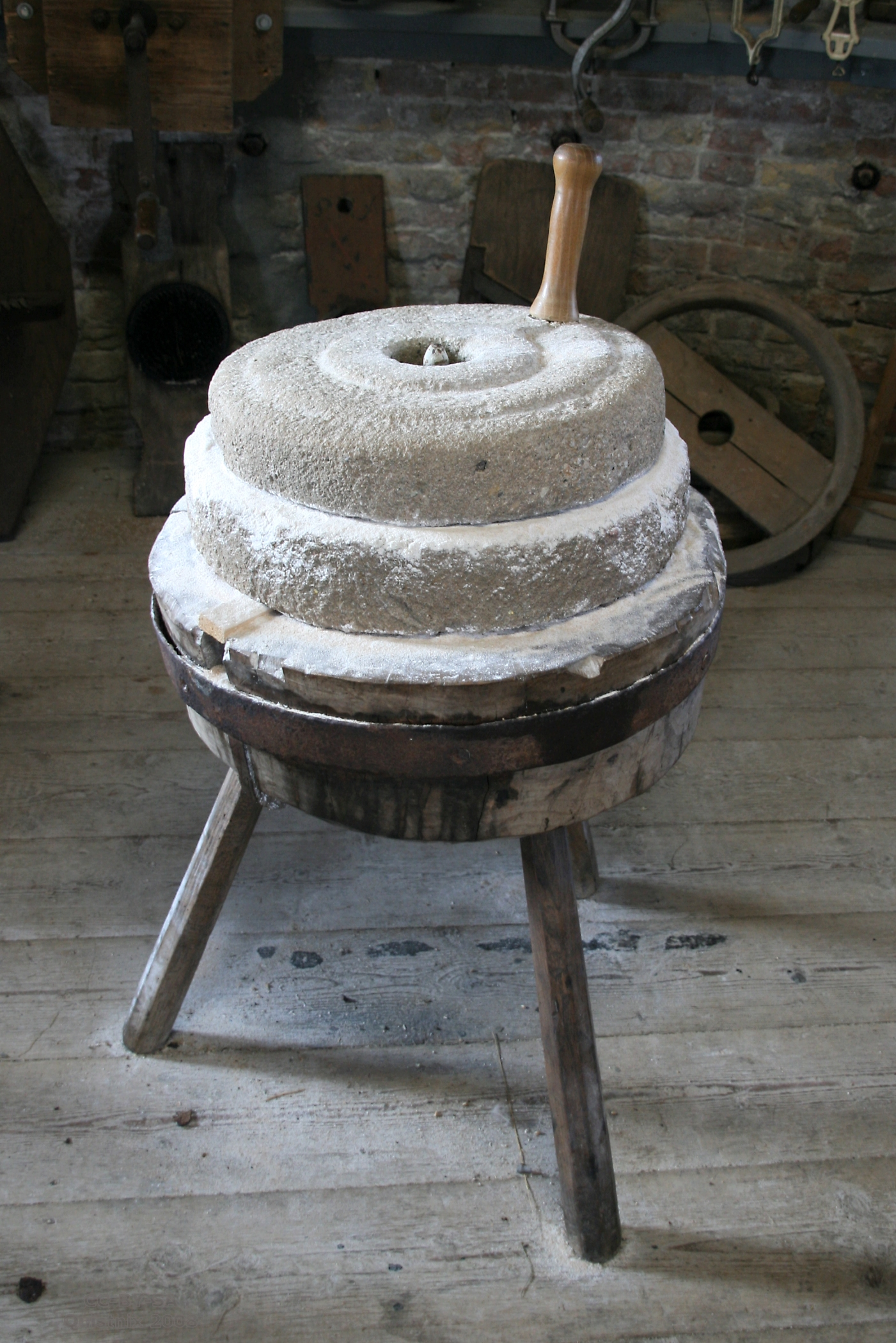 Handkorenmolen, gefotografeerd in IJzendijkse Molen